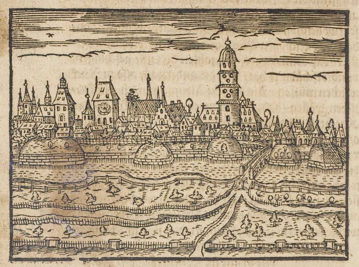 from: Abraham Saur: Theatrum Urbium. Warhafftige Contrafeytung/ und Summarische Beschreibung/ fast aller vornemen und namhafftigen Stätten/ Schlössern und Klöster ..., Frankfurt : Richter, 1610 (Erstausgabe: 1593) Hanau (älteste Ansicht der Stadt)